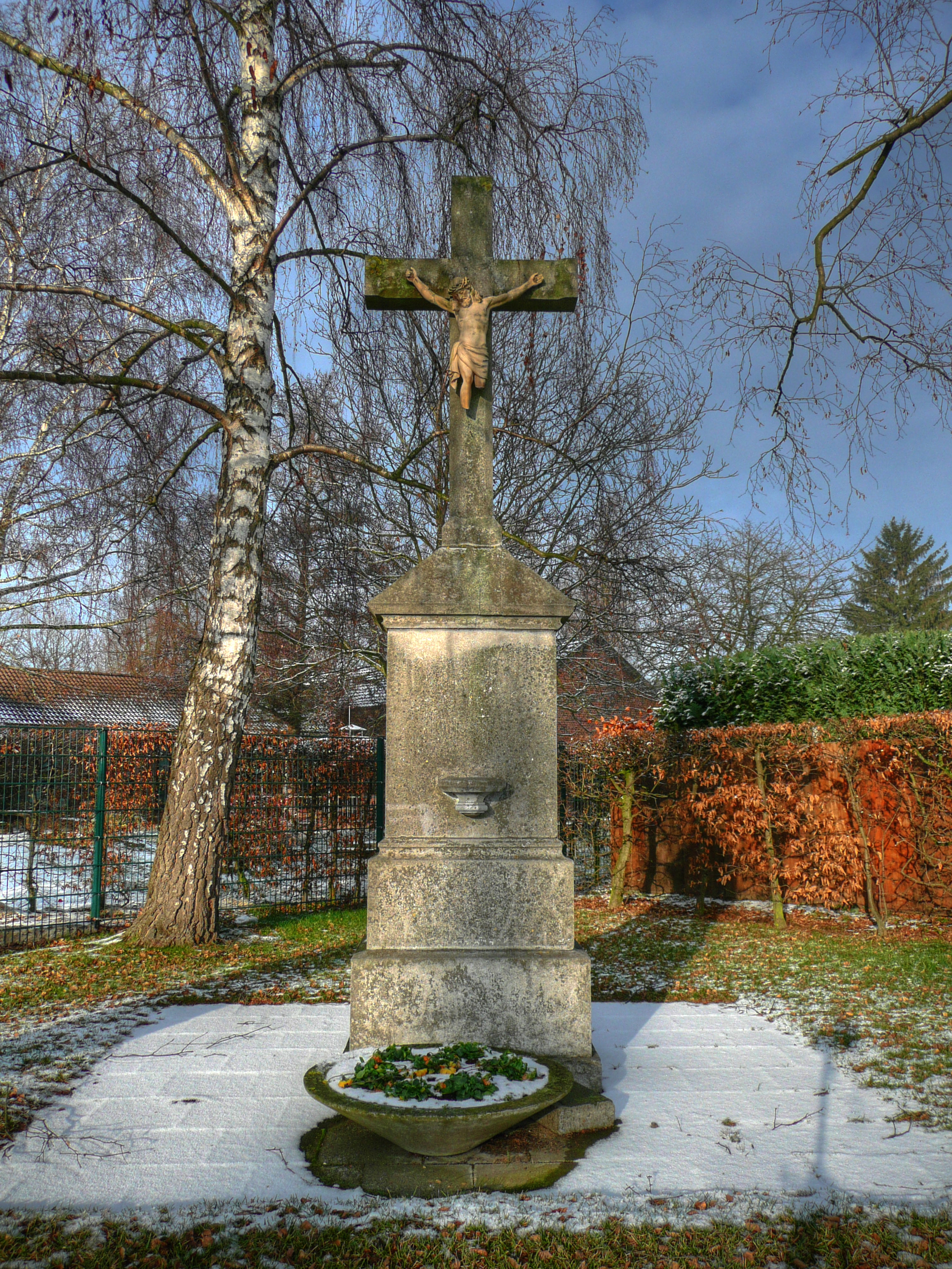 Hochkreuz in der Ortschaft Frauwüllesheim